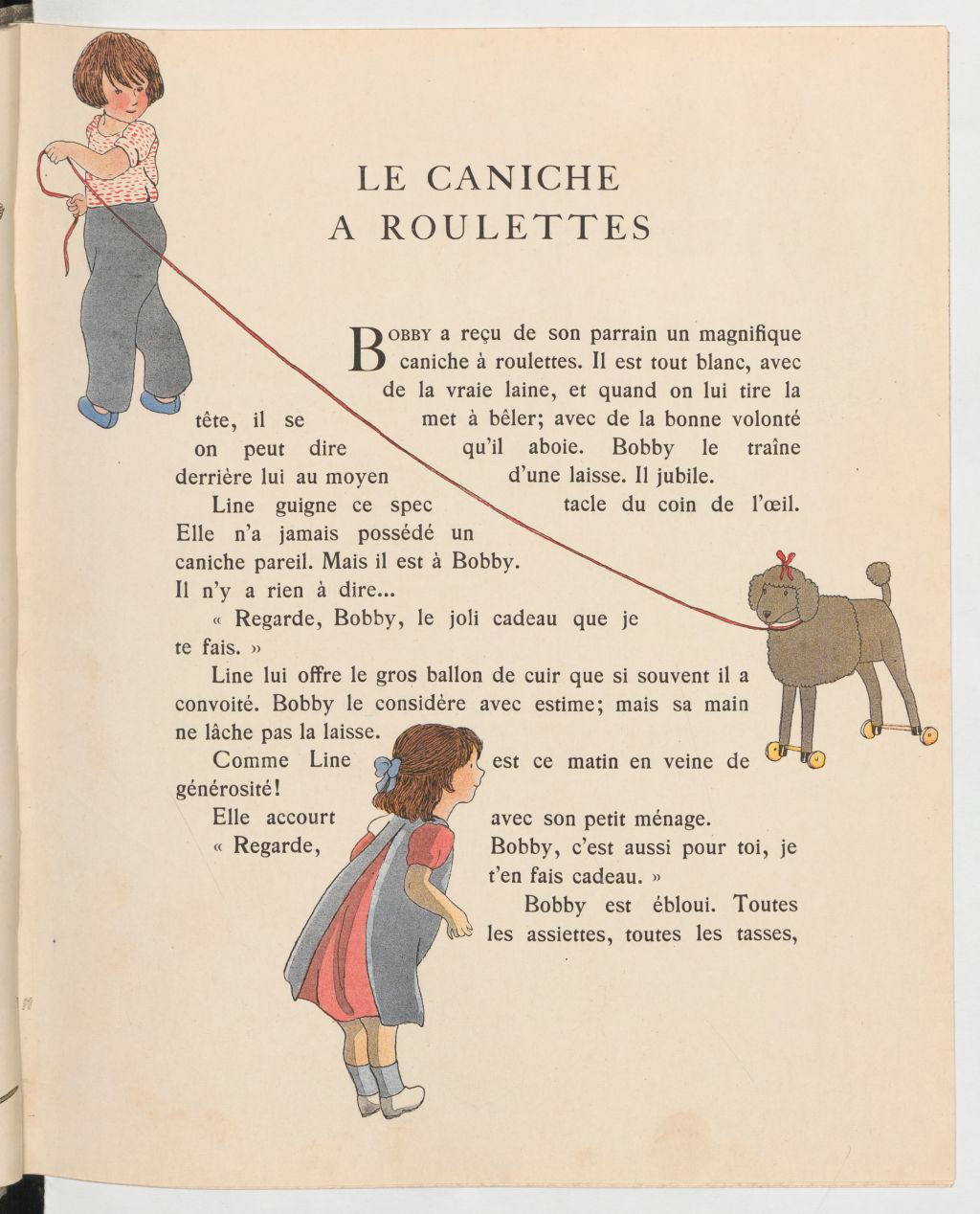 Contes et images, illustrations Marie-Madeleine Franc-Nohain : Le caniche à roulettes, par André Lichtenberger.